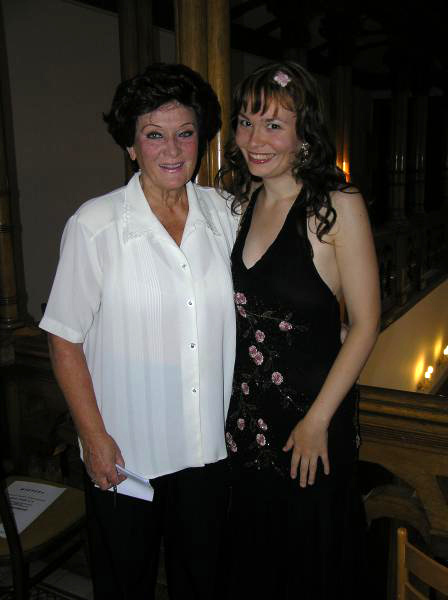 Eva Randová (links), Cornelia Lanz